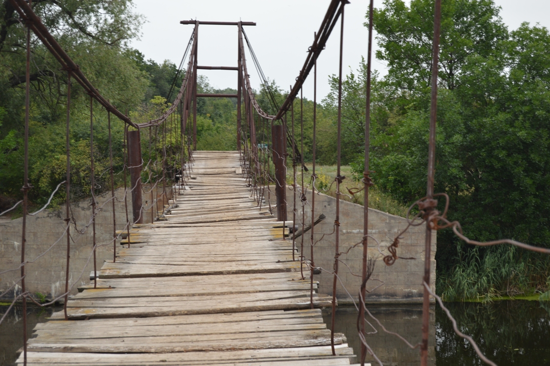 Пішохідний міст через р. Ворскла